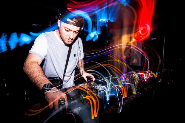 Macky Gee,un dj emblématique du Jump-Up.